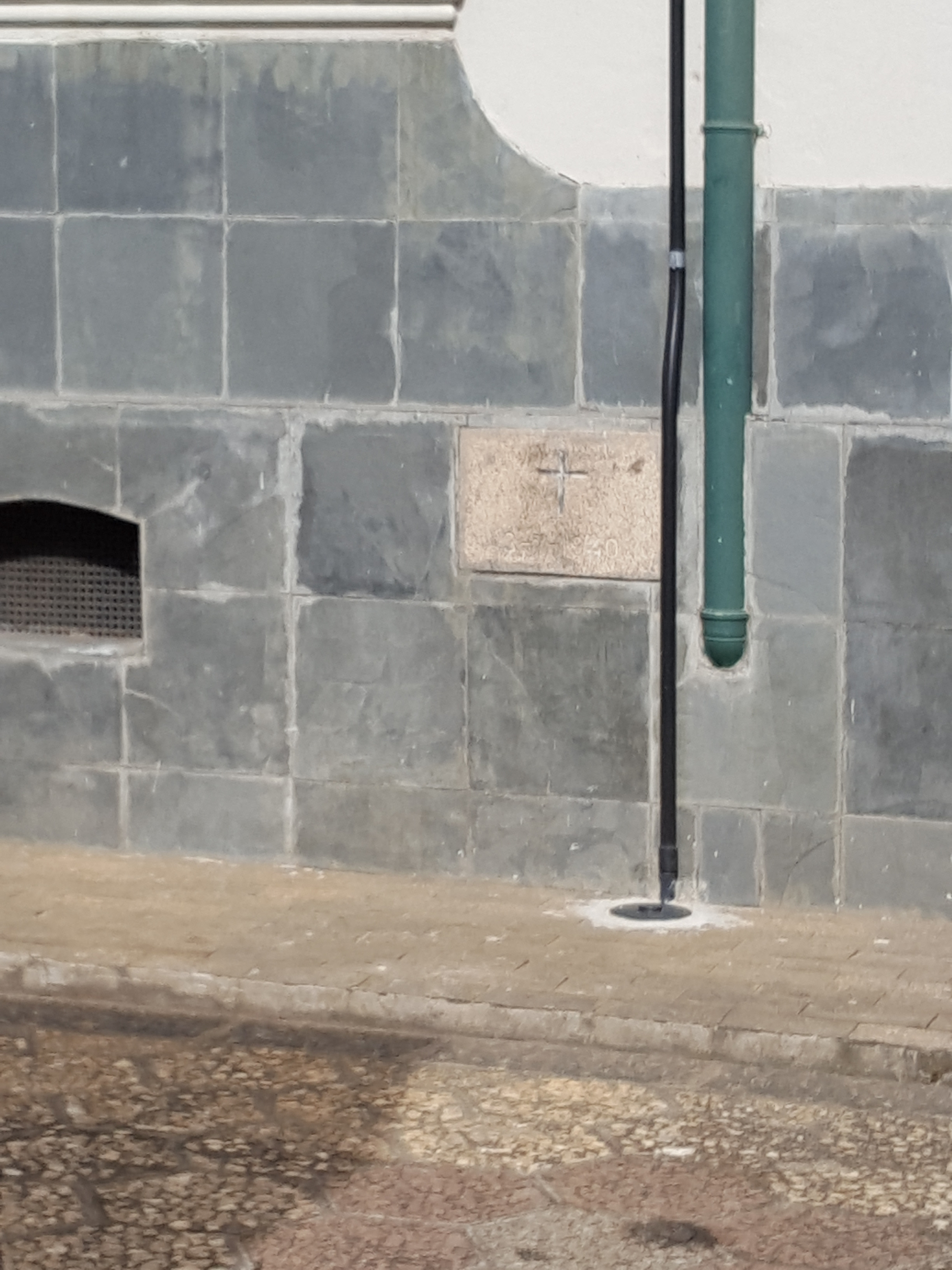 Restos mortais do Padre Chico, próximo a escultura em homenagem do mesmo, na parte interna da entrada principal do Instituto Padre Chico, em São Paulo (SP), Brasil.